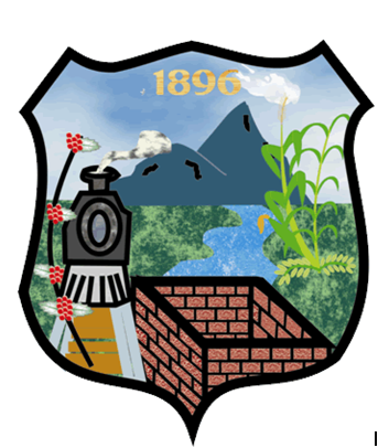 Santa Catalina La Tinta, A.V. Capital de la zona del Polochic